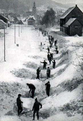 Bahnhof Geising im Winter, Freischaufeltruppe